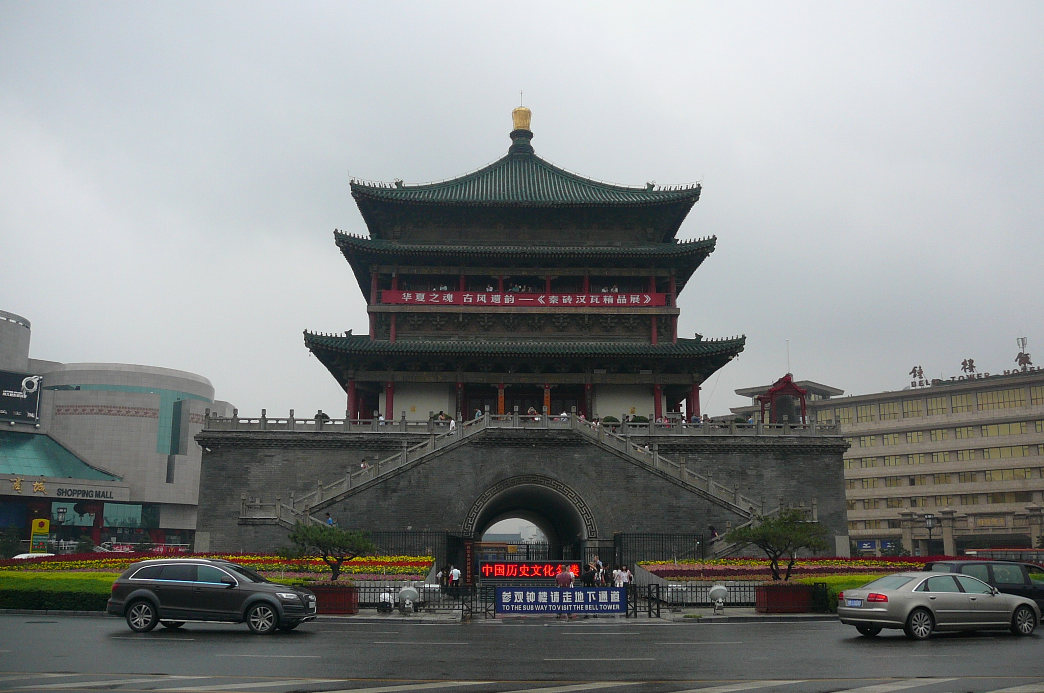 中国陝西省西安市にある鐘楼